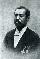 山田斂（貴族院議員）